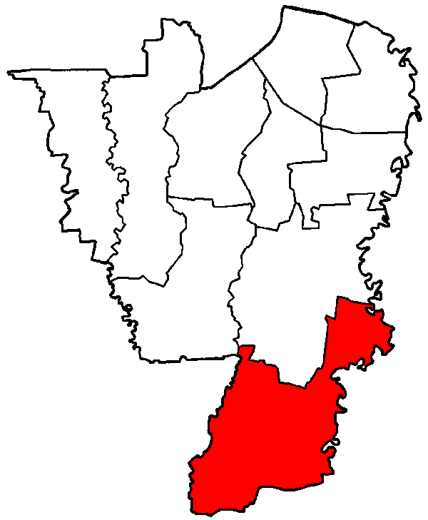 Emplacement du kecamatan de Jagakarsa à Jakarta du Sud, Indonésie